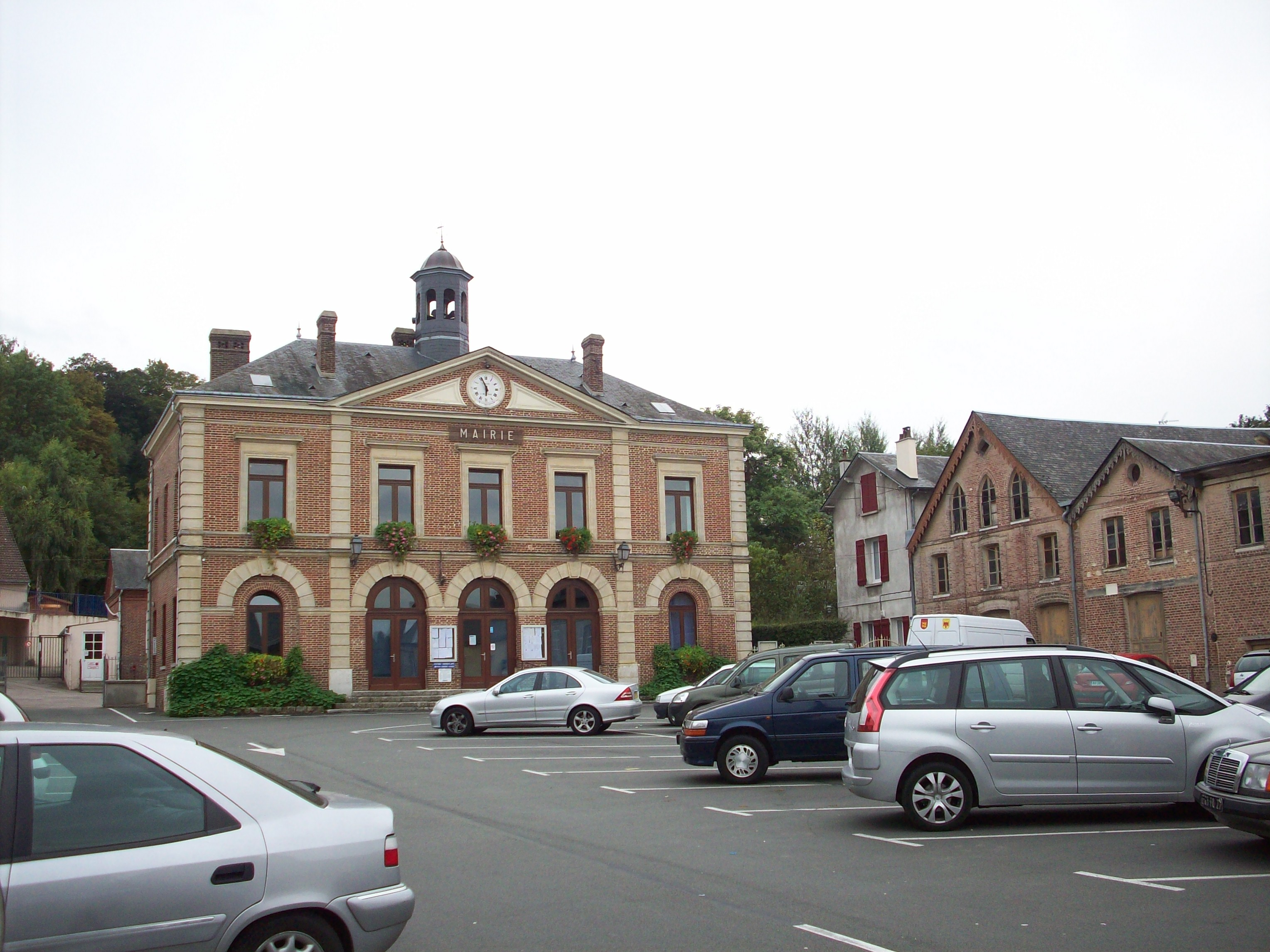 Vue de la mairie de Charleval et de sa place.